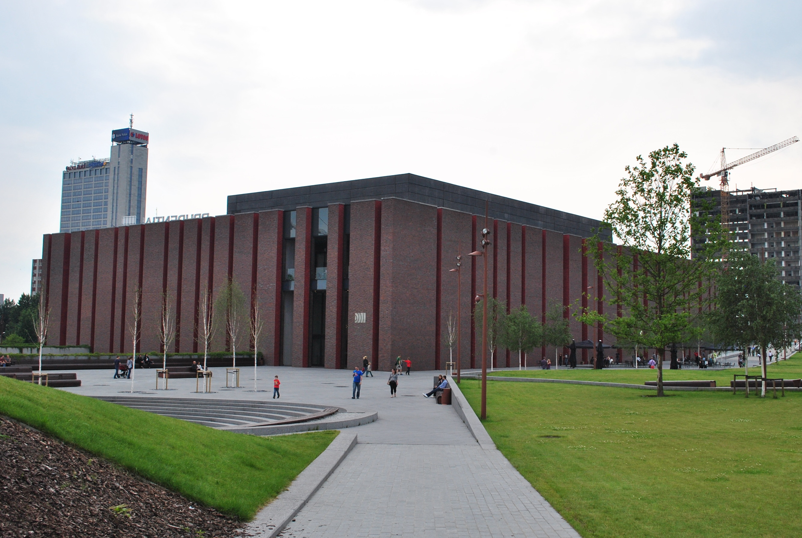 Katowice. Siedziba Narodowej Orkiestry Symfonicznej Polskiego Radia